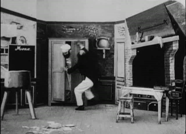 Méliès, La vengeance du gate-sauce (Star Film 243, 1900)